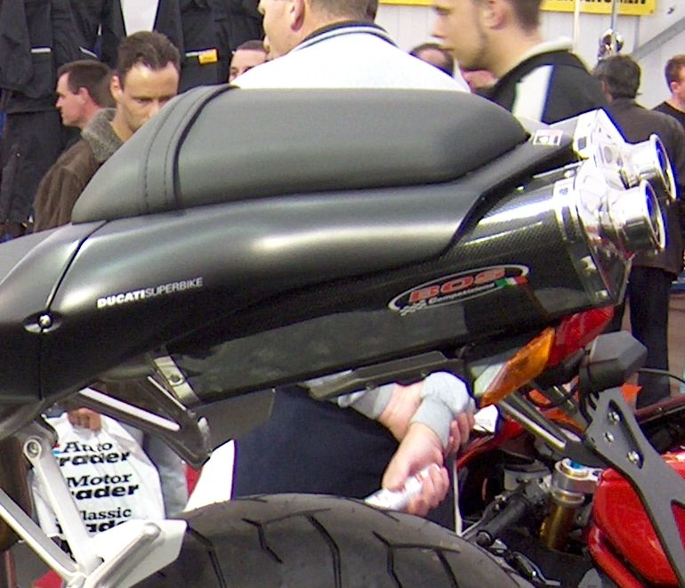 Seat Pipes Ducati 749. Toestemming van Henk Elshout